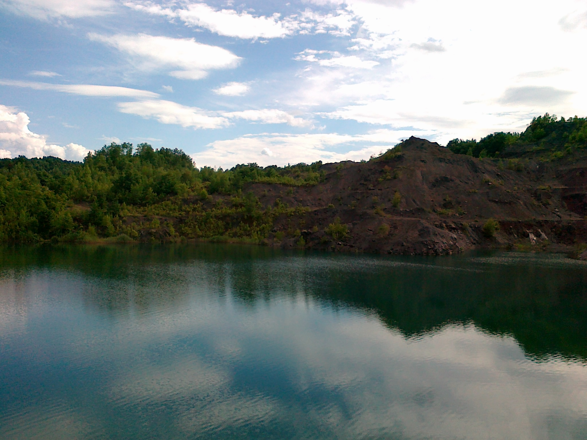 Језеро Љубија, општина Приједор.